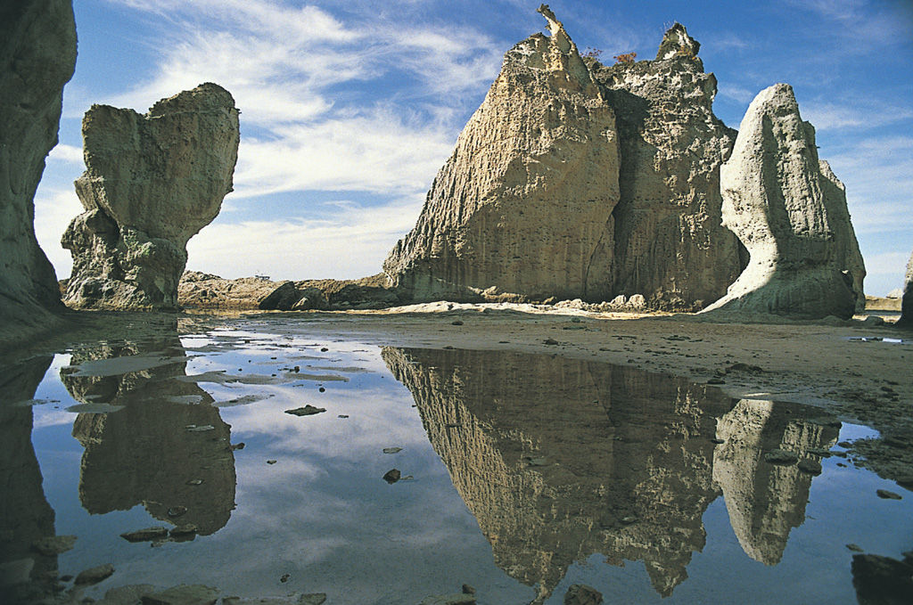 景勝・仏ヶ浦